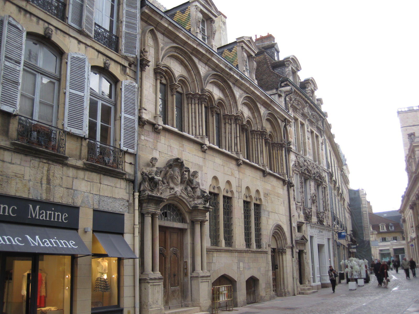 Hôtel Aubriot (Dijon)